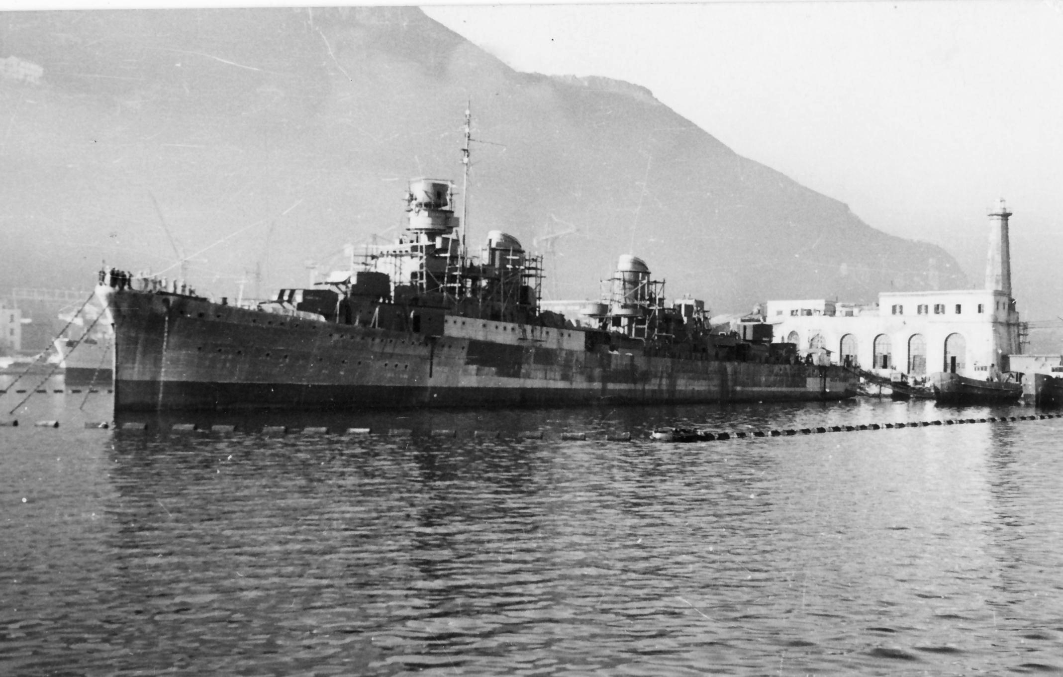 L'incrociatore leggero Giulio Germanico in allestimento nel Cantiere Navale di Castellammare di Stabia